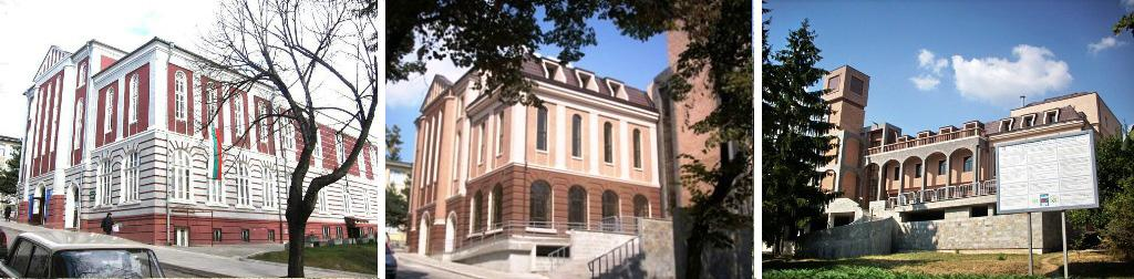 Сградата на народното читалище в Попово преди и след ремонта